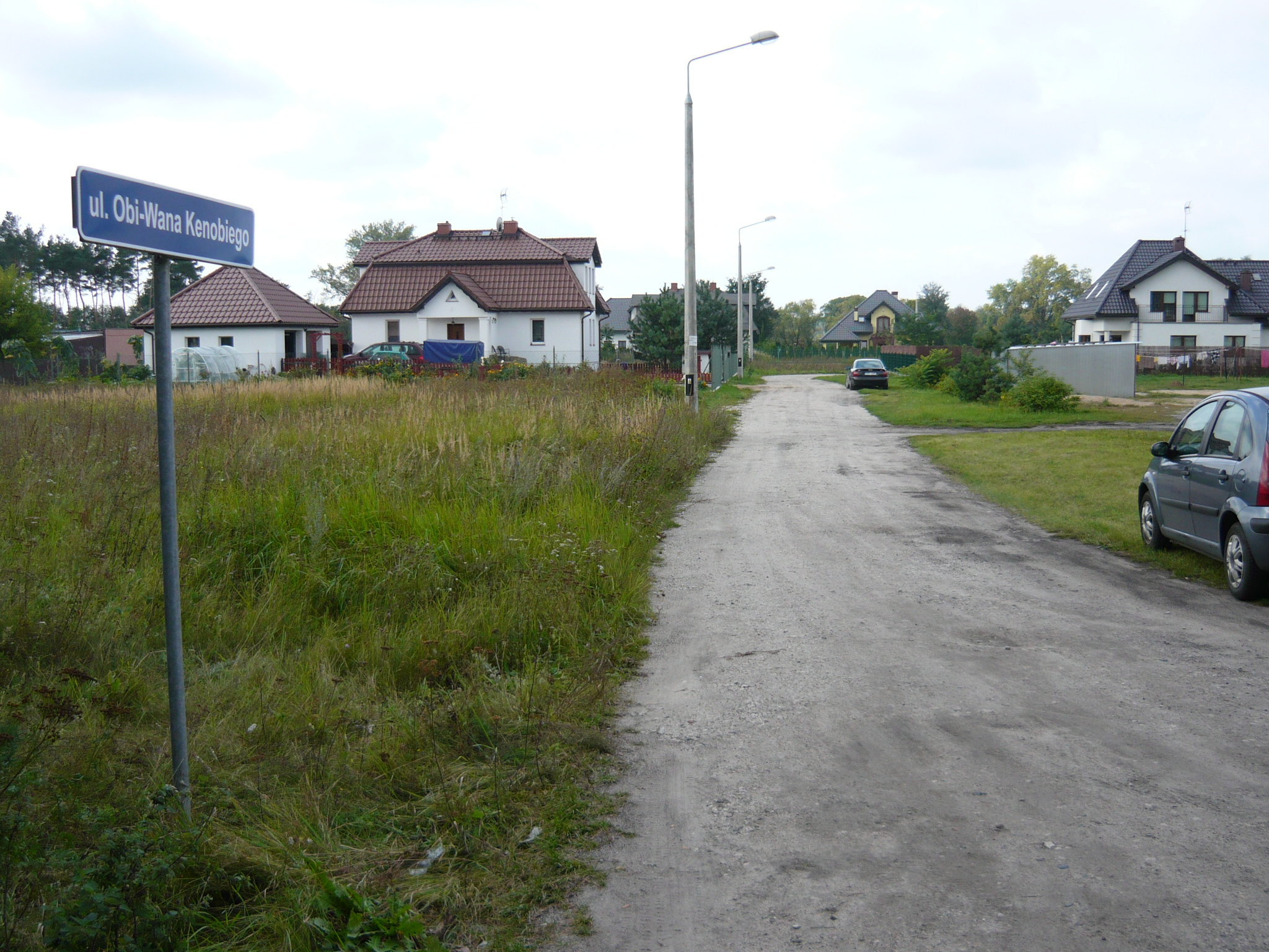 Ulica Obi-Wana Kenobiego we wsi Grabowiec, woj. kujawsko-pomorskie.